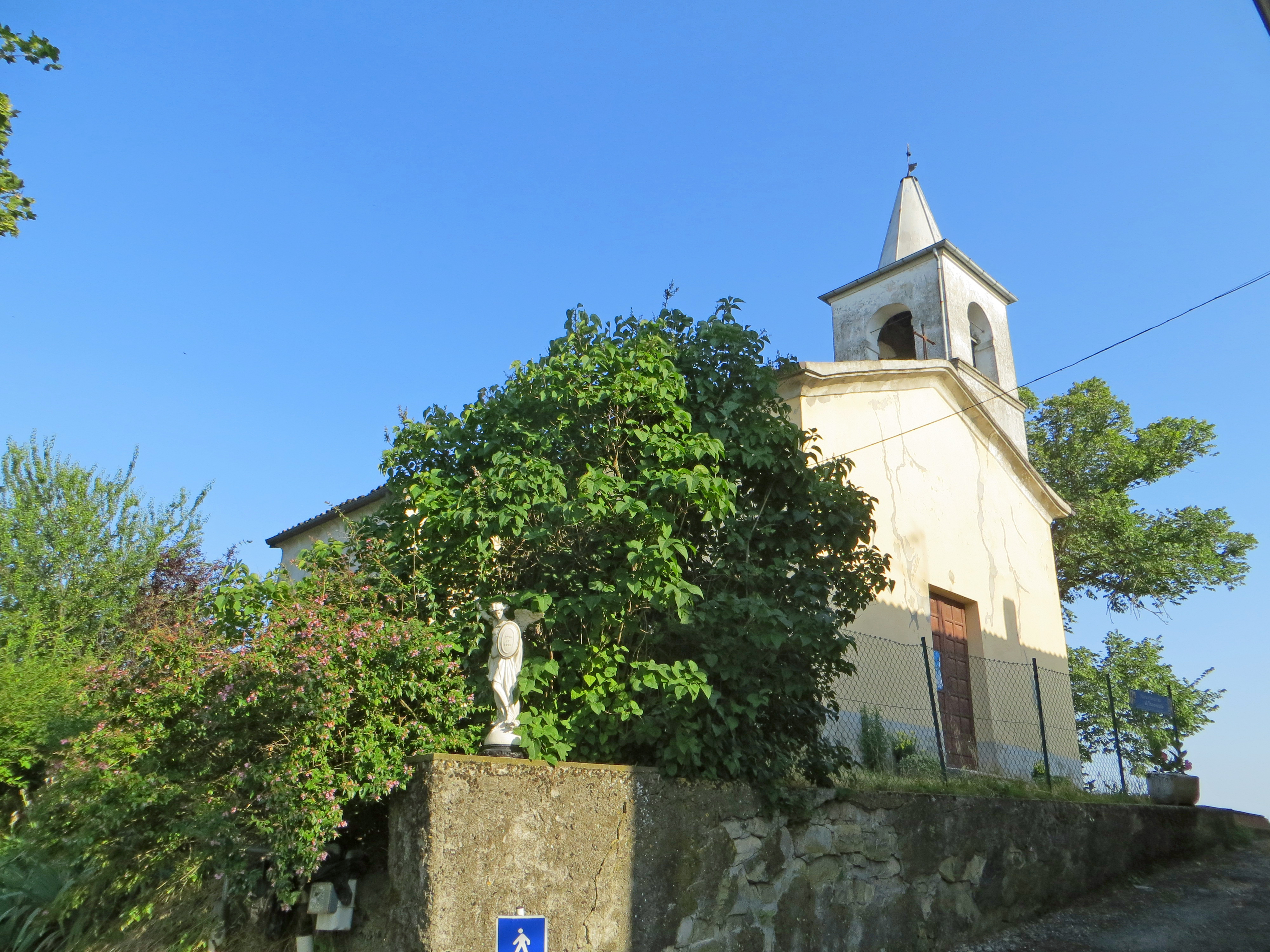 Chiesa di San Michele Arcangelo (Sivizzano, Traversetolo) - facciata e lato nord